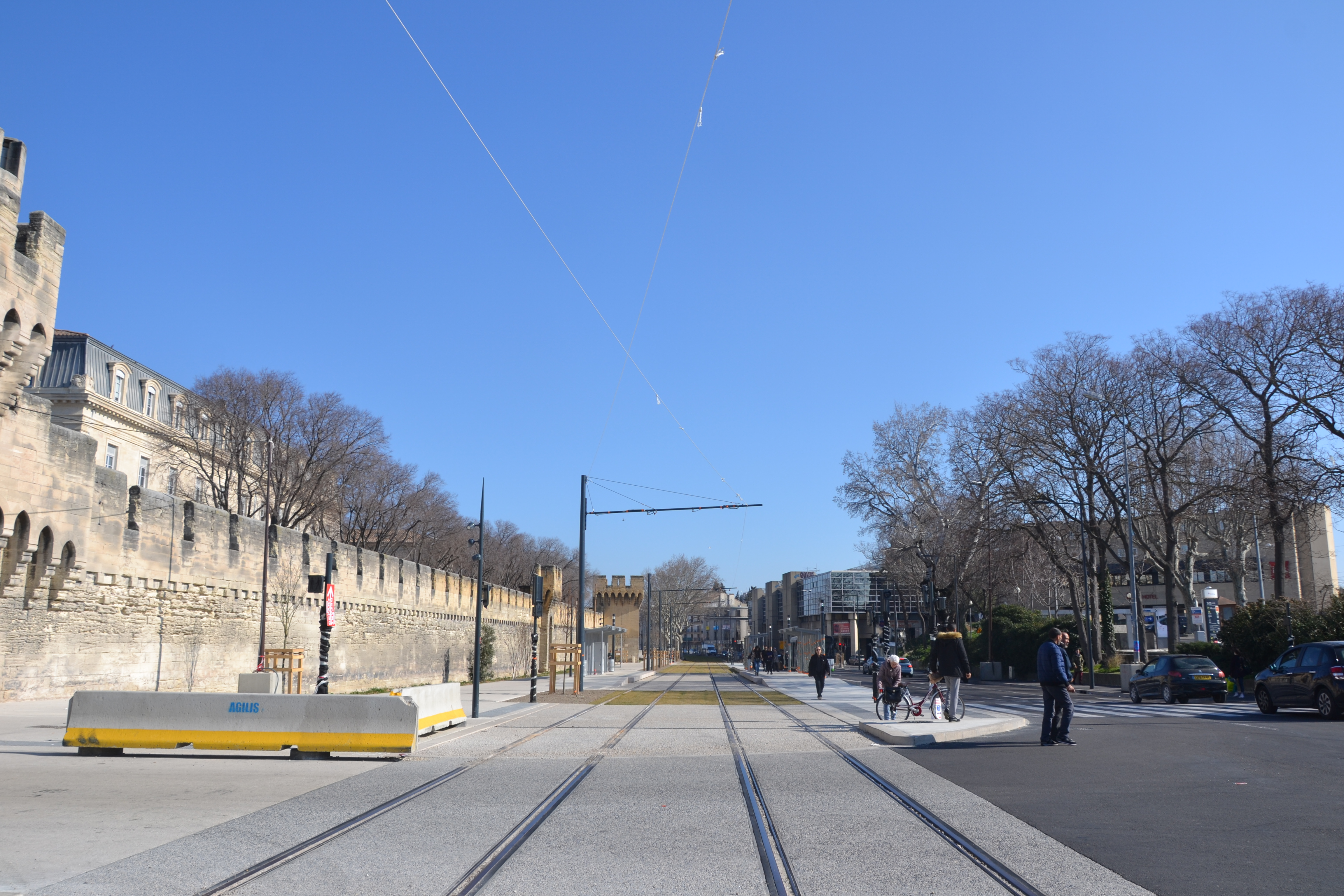 nouvelles voies du Tram d'Avignon